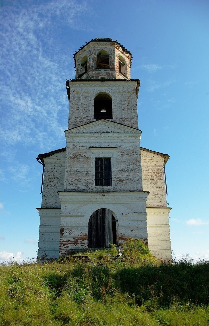 Колокольня Храма Вознесения Господня на Ворбасе